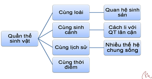 Các tiêu chuẩn thông thường của một quần thể sinh vật.